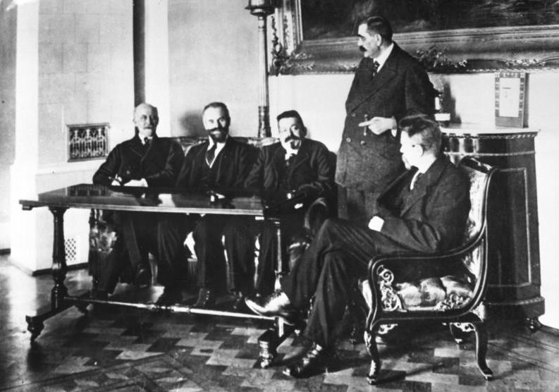 Weimarer Regierung, Scheidemann, Prof. Landsberg, Ebert, Nosske und Wissel (von links)